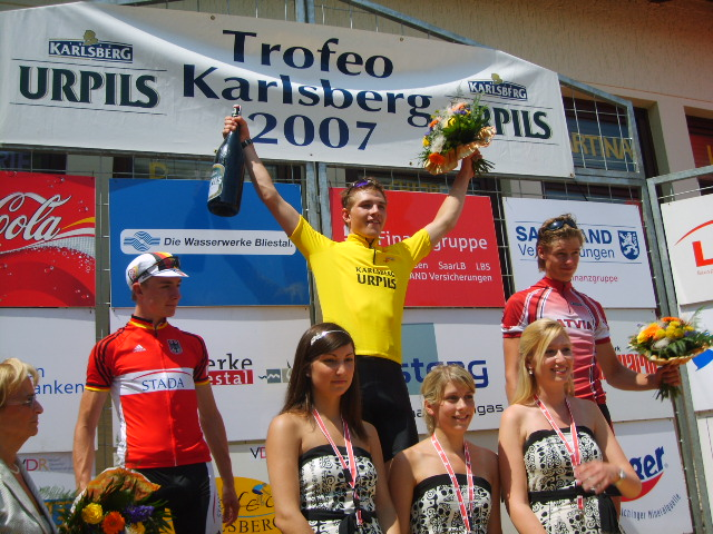 Ersten drei in der Gesamtwertung der 20.Trofeo Karlsberg 2007